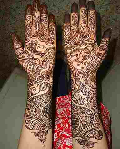 Latest Mehndi Design